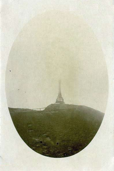 Crucea Eroilor de pe Muntele Caraiman - carte poștală